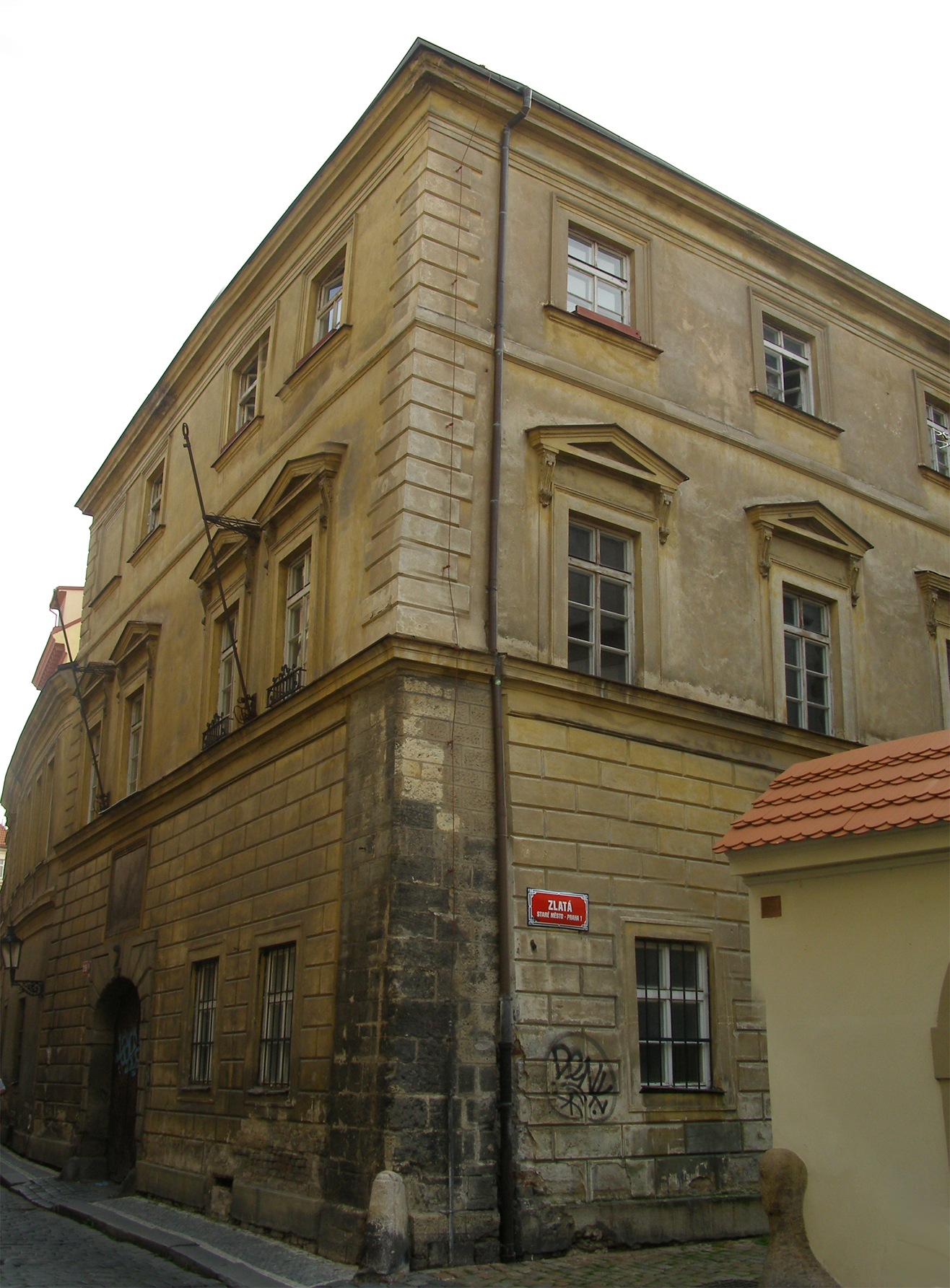 Měšťanský dům U Voříkovských (Staré Město), Praha 1, Liliová, Zlatá 219/5, Staré Město